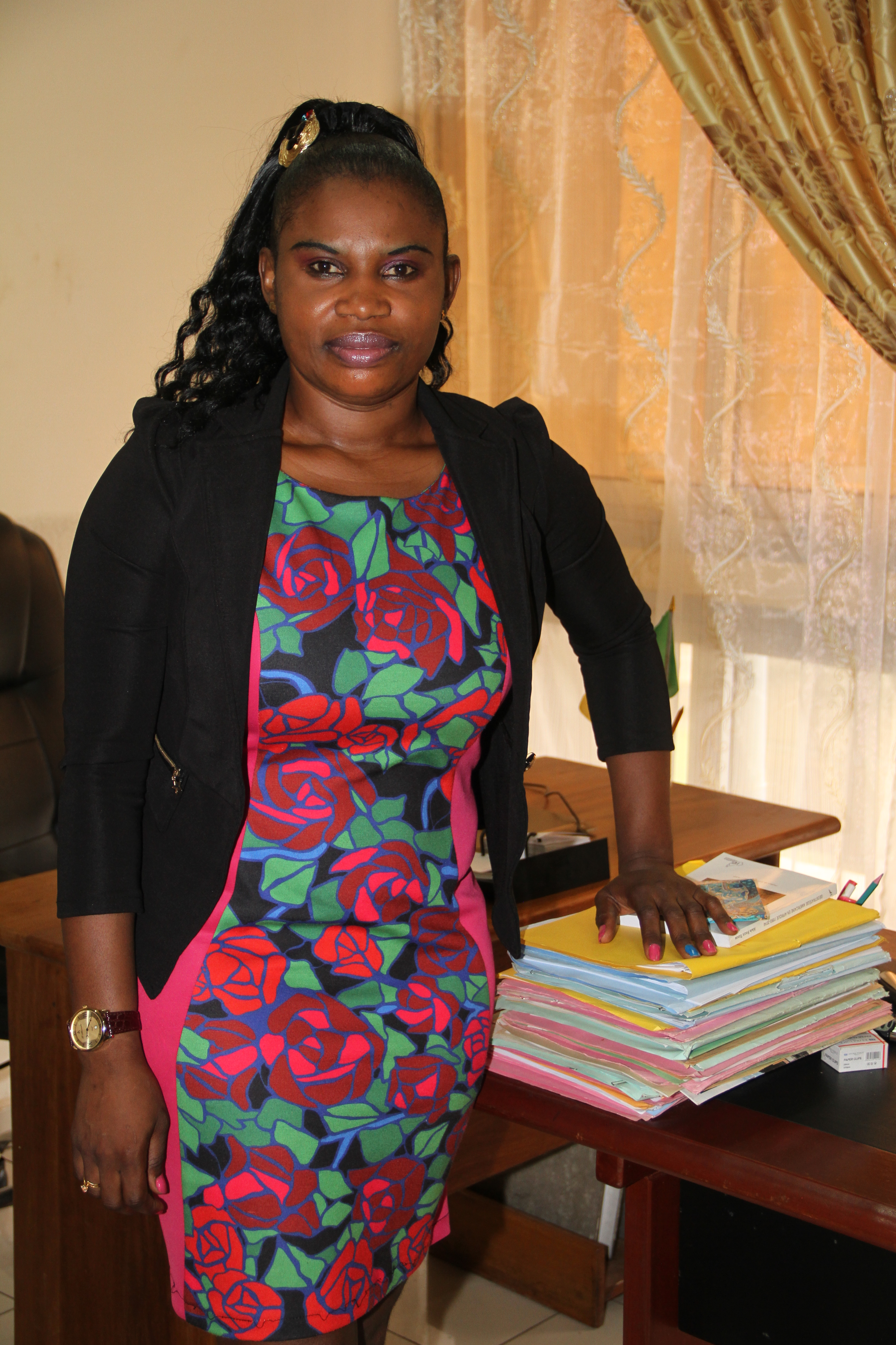 L'écrivaine et diplomate Carine Pilo dans son bureau au Ministère des relations extérieures du Cameroun